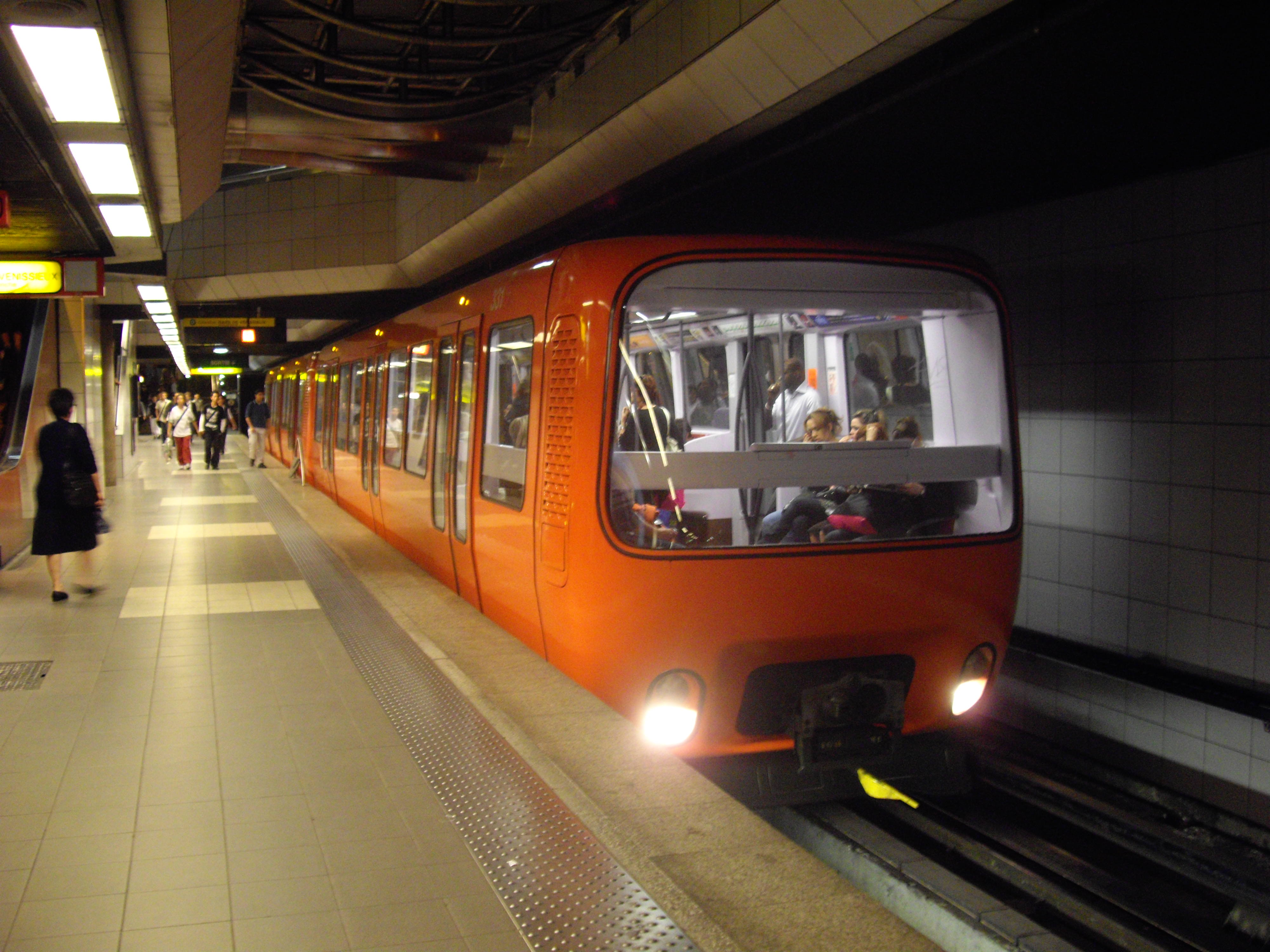 La rame 16 de la ligne D, à la station Bellecour